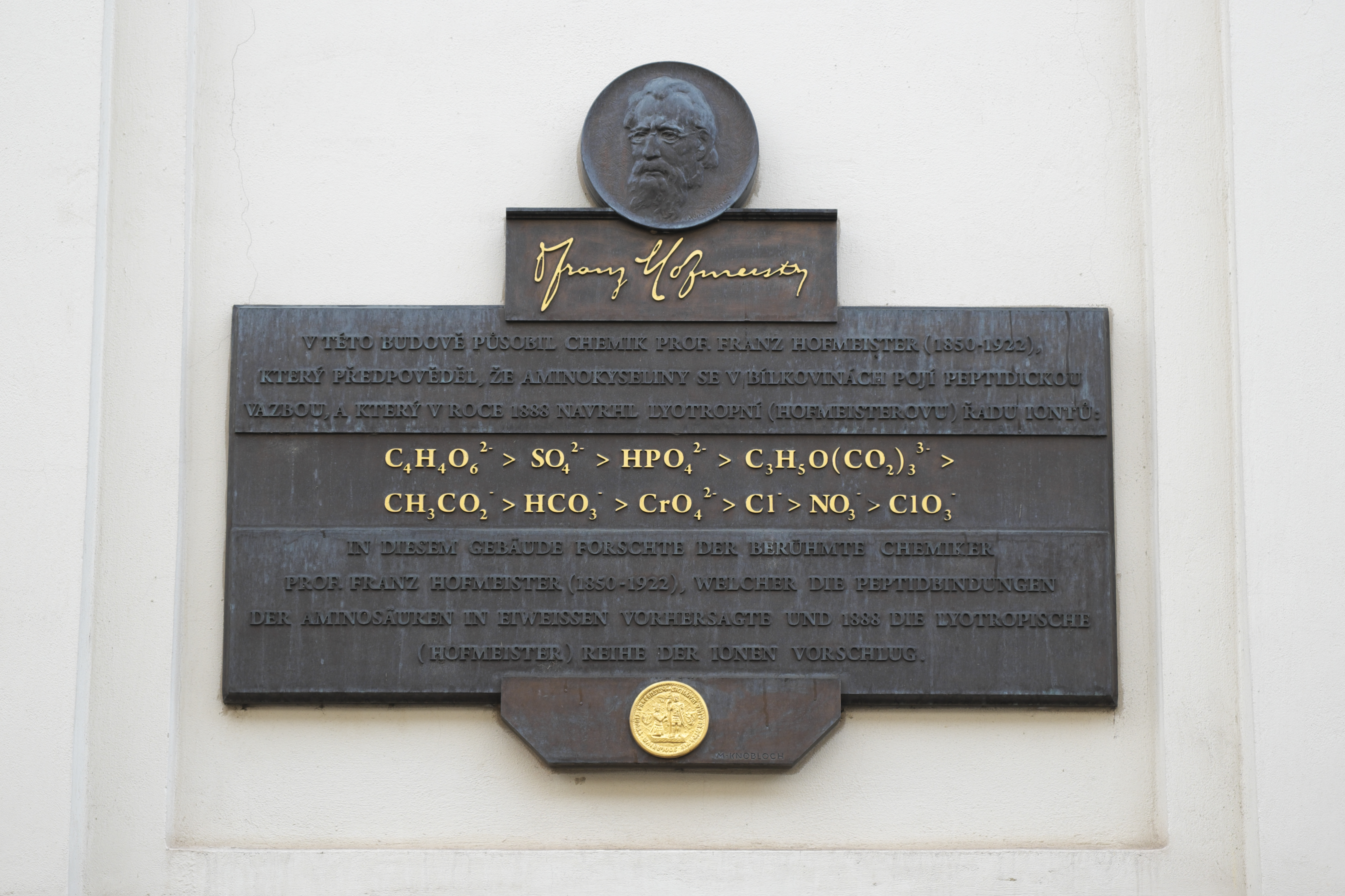 Medizinische Fakultät der Karls-Universität in der Prager Neustadt (Tschechien), Gedenktafel für Franz Hofmeister